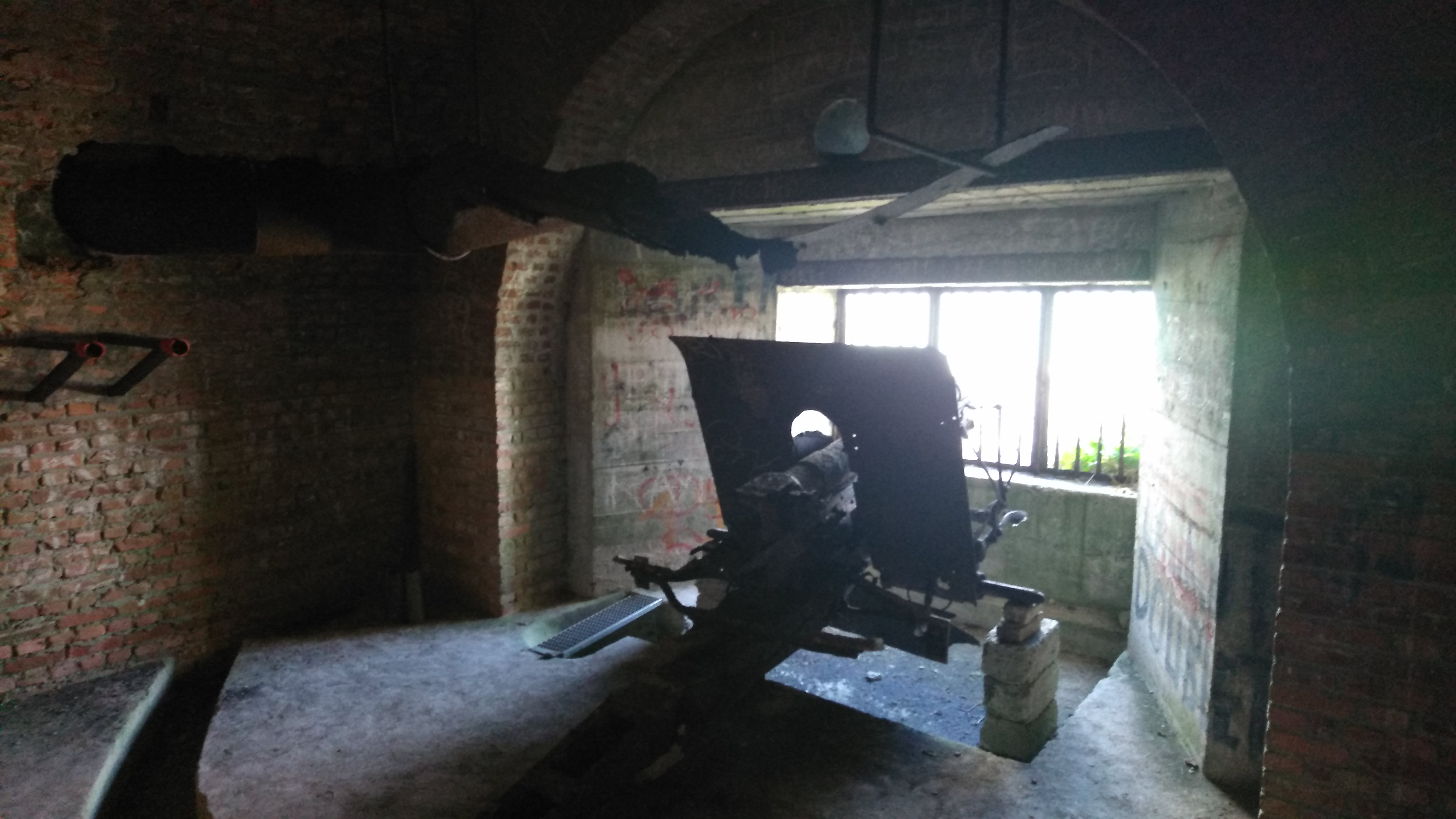 Kahl-Burg - LE TREPORT (76) - casemate du canon de 75mm